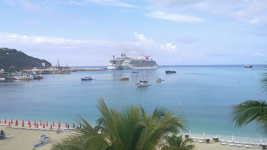 Gisteren lagen er twee cruiseschepen (uitzicht vanaf ons terras)